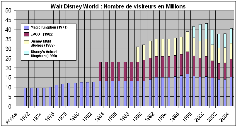 Tableau d'évolution du nombre de visiteurs du Walt Disney World, avec répartition par parc. NB: les chiffres de 1971 à 1996 sont des estimations (sauf 1983) basées sur les "étapes" franchies par Disney : Mars 1976: 50 millionième visiteur Octobre 1979: 100 millionième visiteur Juillet 1987: 250 millionième visiteur Auôt 1992: 400 millionième visiteur 13 octobre 1995: 500 millionième visiteur 24 juin 1998: 600 millionième visiteur 1983, source Disney Enterprises Pour 1997, 1998 et 2004, Source American Business Magazine De 1999 à 2003 Source Orlando Sentinel